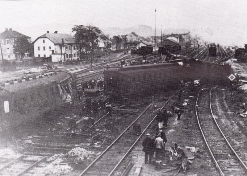 Am 25. Oktober 1939 fährt in St. Valentin (Niederösterreich) um 18.55 Uhr der D54 trotz des in Ablenkung zeigenden Einfahrtssignal mit voller Geschwindigkeit in die Ablenkung. Während die Lokomotive die erste Weiche, die in die Ablenkung steht, ohne zu entgleisen passiert, entgleist die Lokomotive 12 006 bei der nächsten Weiche. Der Unfall forderte 17 Tote, 8 Angehörige der deutschen Wehrmacht und 9 Zivilpersonen, darunter der weltberühmte Chirurg Prof. Dr. Anton Freiherr von Eiselsberg.